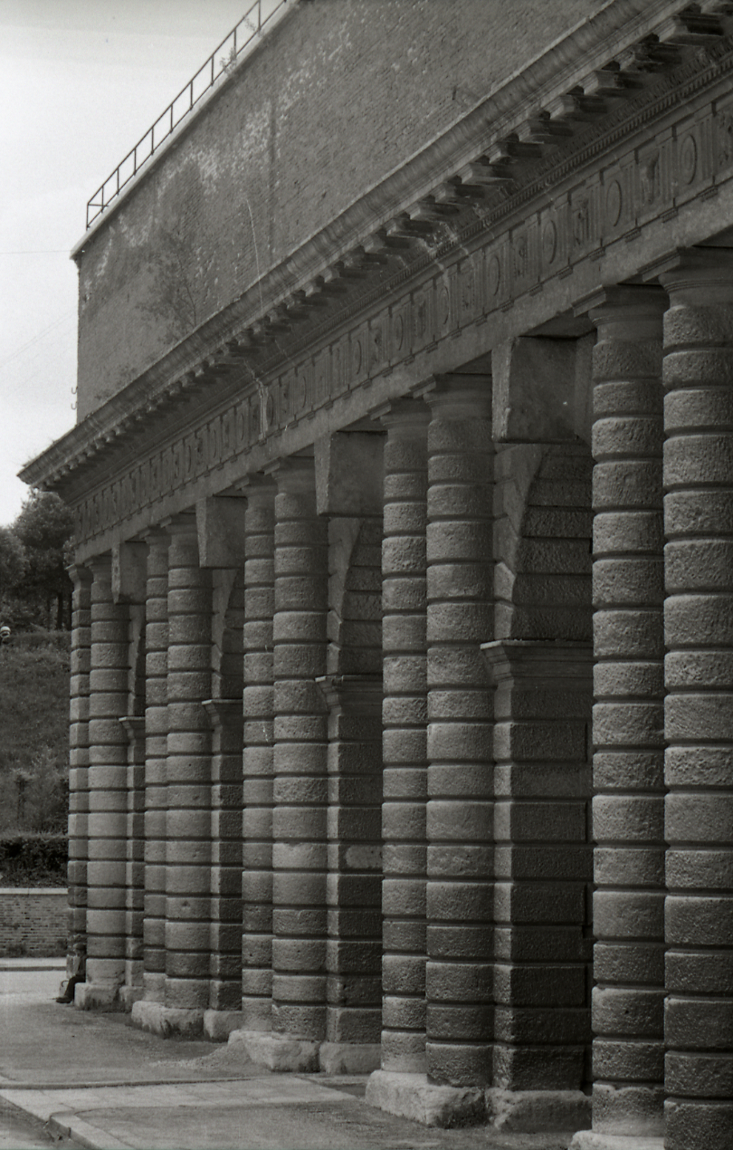 Servizio fotografico : Verona, 1972 / Paolo Monti. - Strisce: 7, Fotogrammi complessivi: 37 : Negativo b/n, gelatina bromuro d'argento/ pellicola ; 35 mm. - ((Sul portanegativi: NIKMAT PanF. - . - Occasione: Documentazione per la pubblicazione: Brugnoli Pier Paolo, "Nella bella Verona", Bologna, Cappelli, 1972. - Fonte: Agenda di Paolo Monti: Leica 1501-3000 Controllo numerazione (1950-1978), presso Archivio Paolo Monti. - Fonte: Monografia di Brugnoli, Pier Paolo: Nella bella Verona, Bologna, Cappelli (1972). - Fonte: Fattura di Paolo Monti: IV. Commesse/ Fattura/ Fotografie per illustrazione del volume Verona (1972/12/20), presso Archivio Paolo Monti. N. 292 riprese fotografiche della città di Verona in formato 24x30